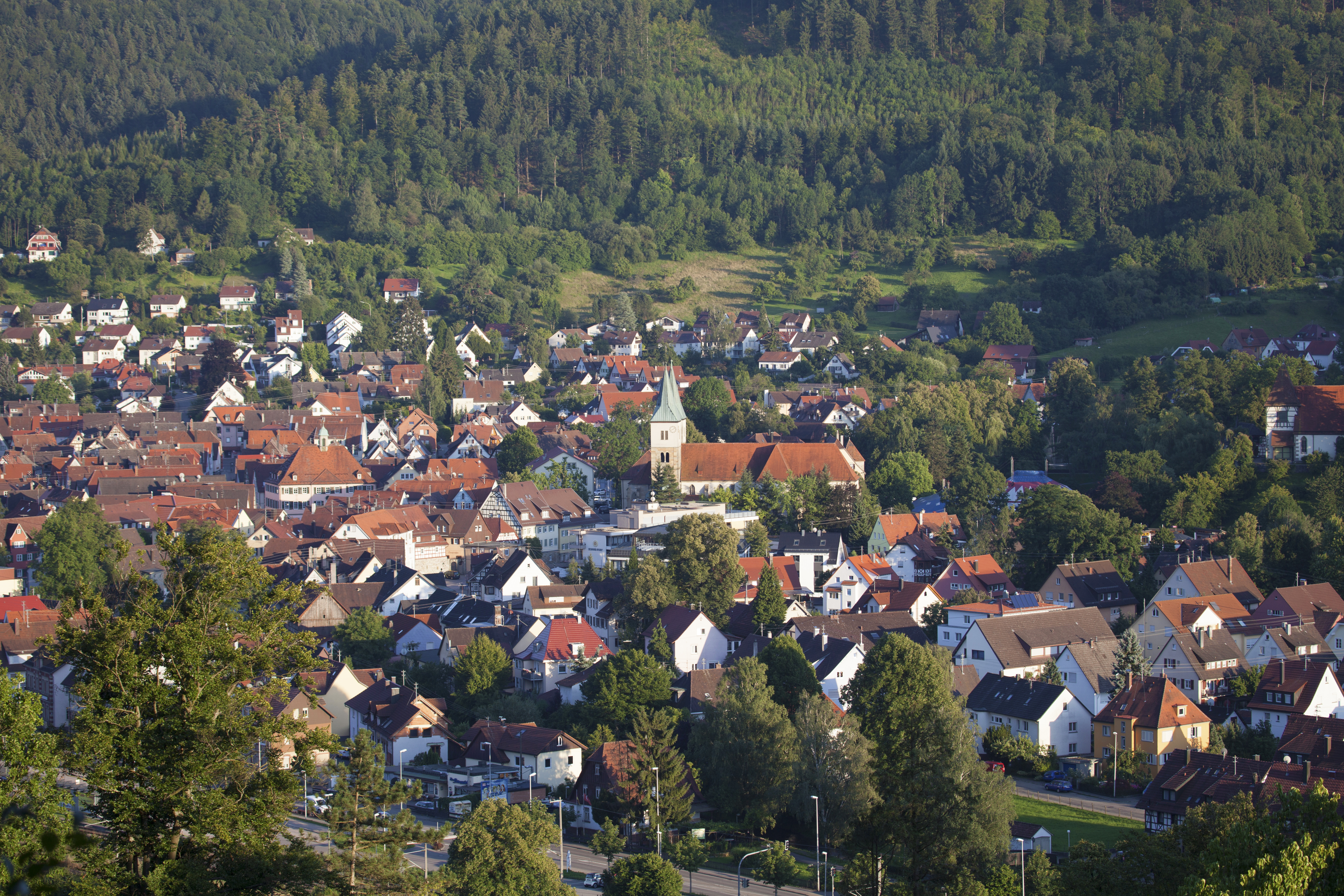 Ansicht von Murrhardt